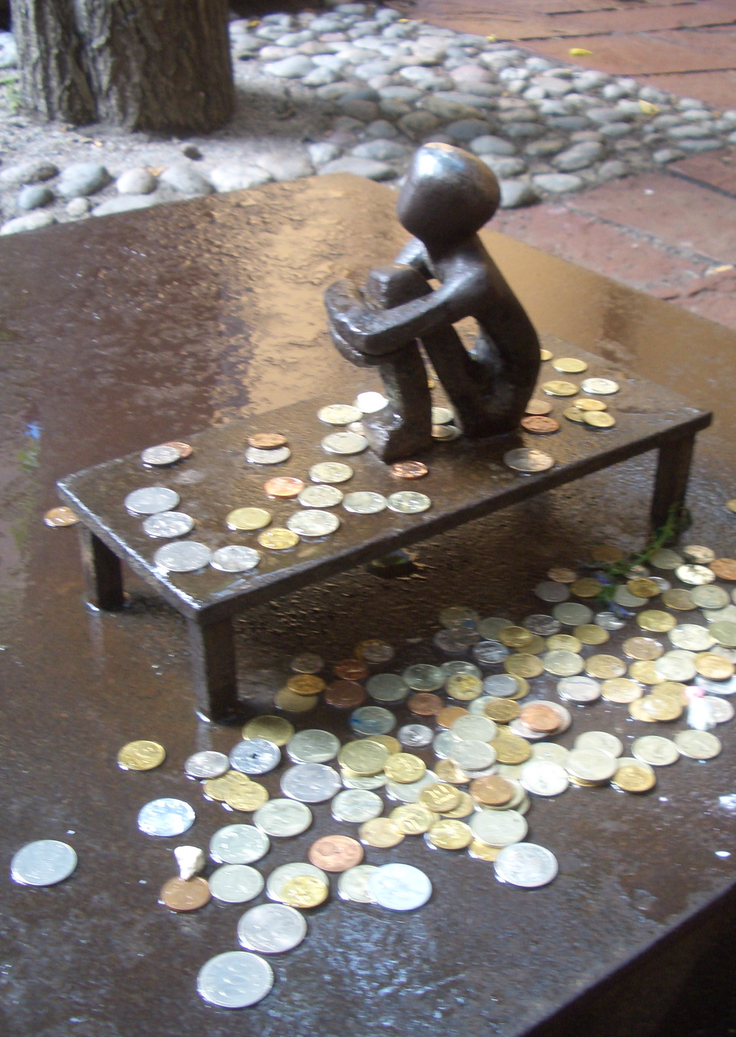 Small statue found at Bollhustäppan in Gamla stan, Stockholm.